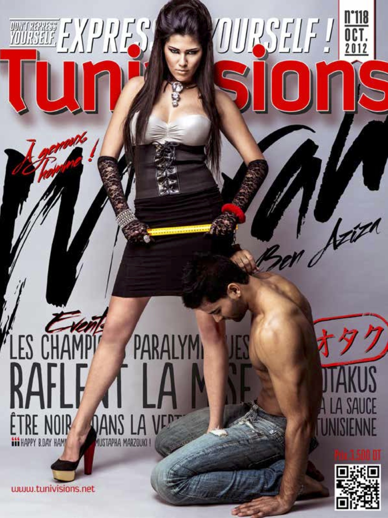 Couverture du numéro 118 du magazine tunisien Tunivisions.